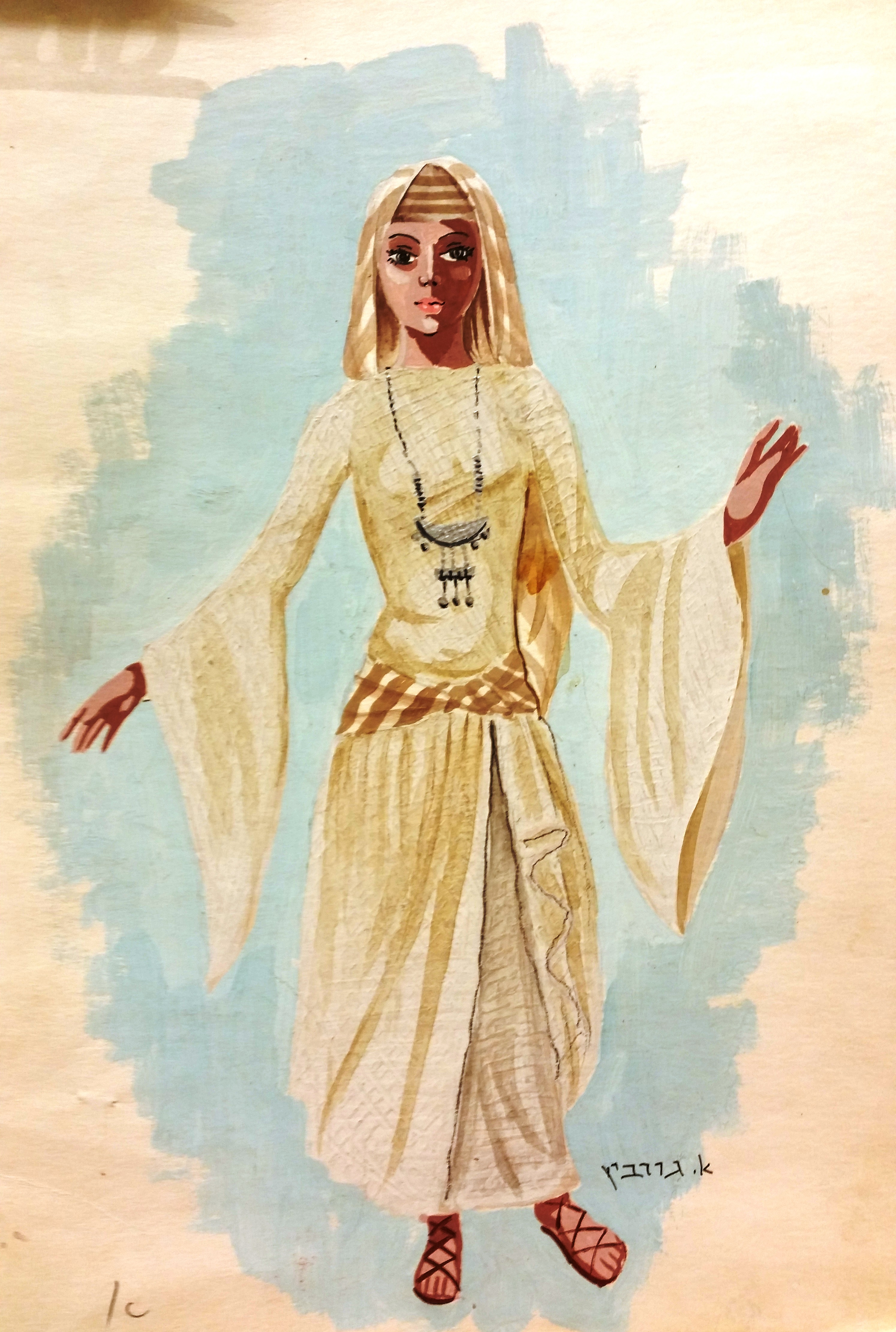 סקיצה 2 להצגה "נתן החכם". תיאטרון "הבימה" 1966